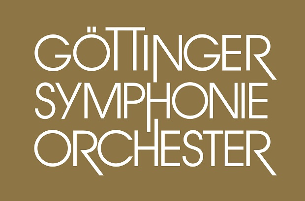 Das Logo des Orchesters